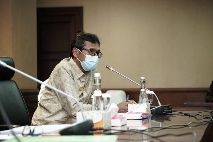 Gubernur Sumbar: MTQ Nasional XXVIII Dilaunching 24 Juli